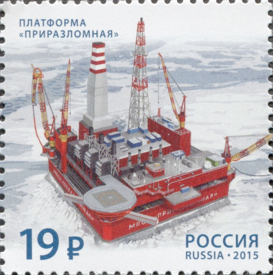 Морской флот России. Продолжение серии